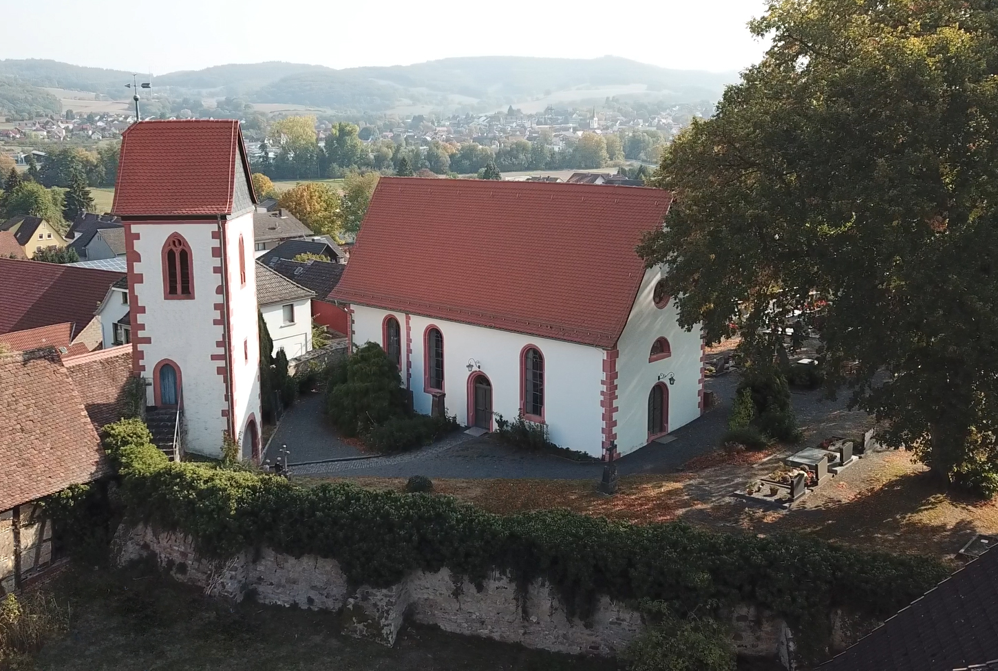 Mittelalterliche Wehrkirche auf dem Kirchfriedhof in Wersau. Links der Tor- und Glockenturm - das Wahrzeichen Wersaus. Im Vordergrund die historische Wehrmauer. Im Hintergrund der Fusslauf der Gersprenz und das Nachbardorf Brensbach.